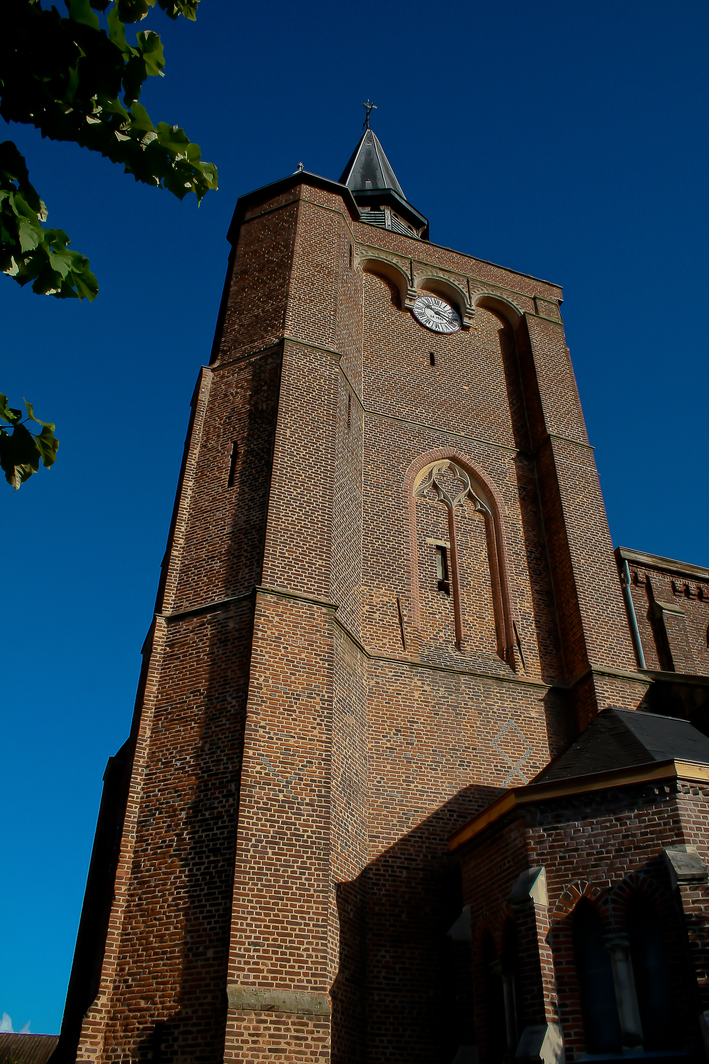 Tour de l'Eglise de St Jans Cappel